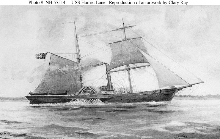 USRC Harriet Lane